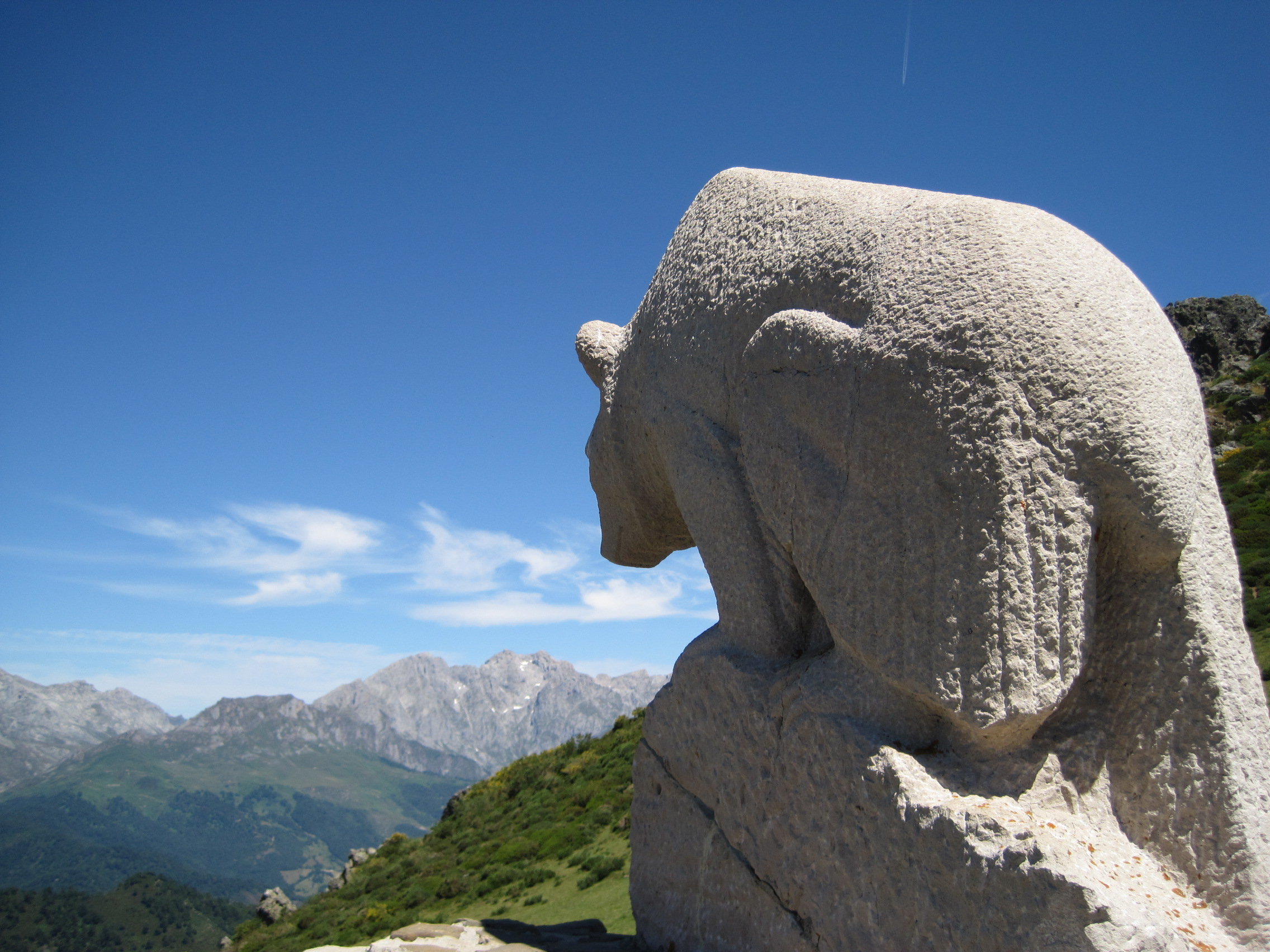 Monumento al Oso, en el collado de Llesba, puerto de San Glorio (León-Cantabria, España).